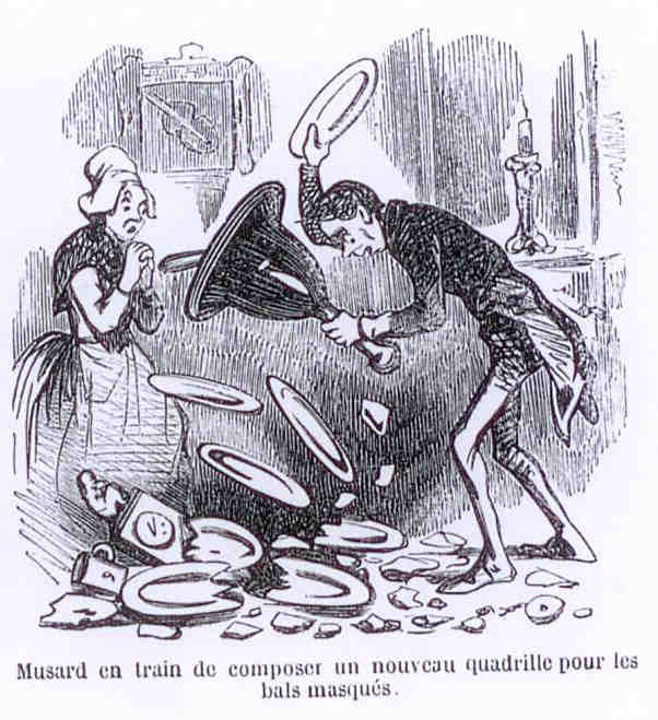 Philippe Musard compose un bruyant quadrille pour les bals masqués du Carnaval de Paris.